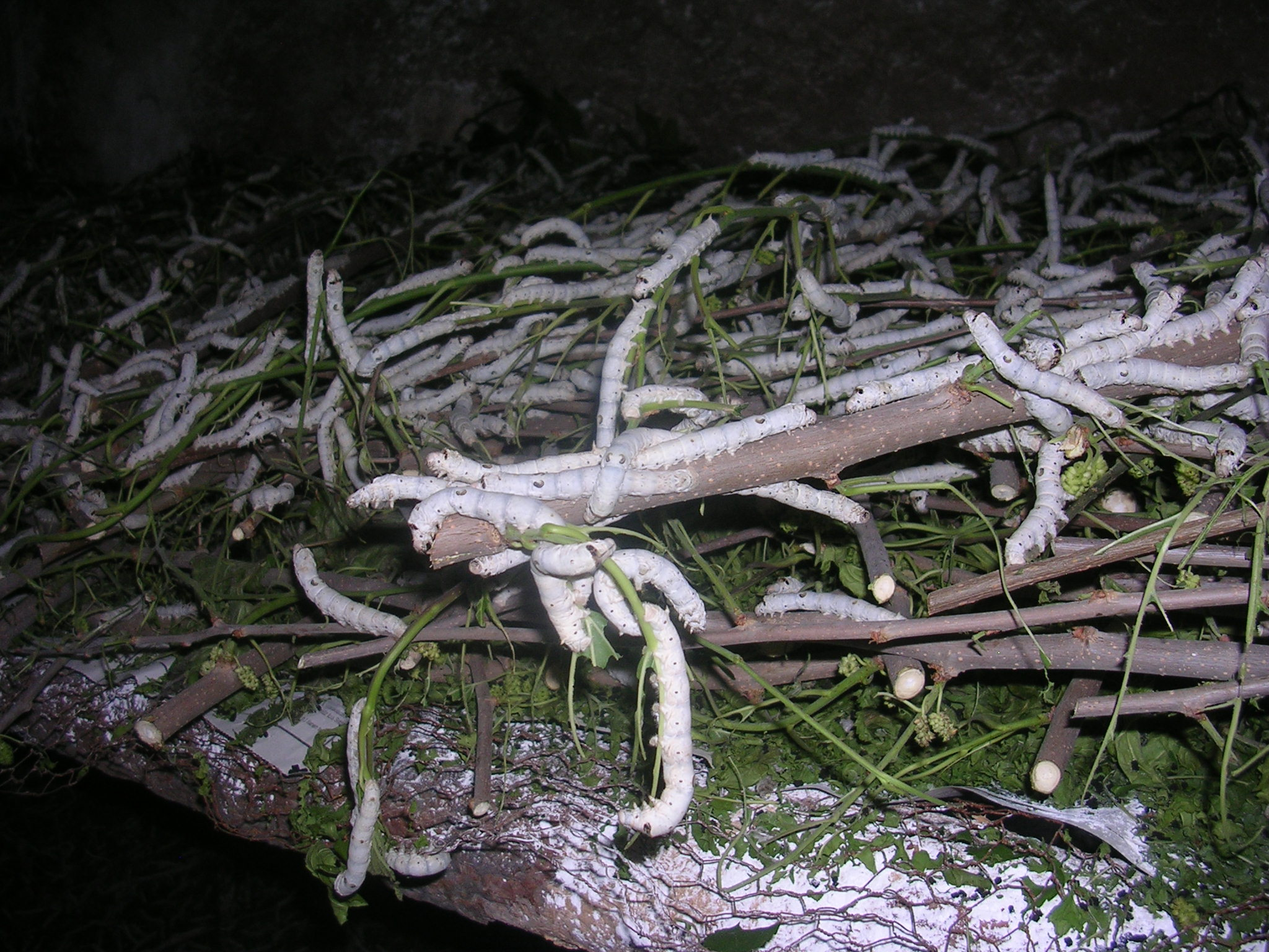 İpek Böceği Yetiştiriciliği, Gürleyik, Eskişehir